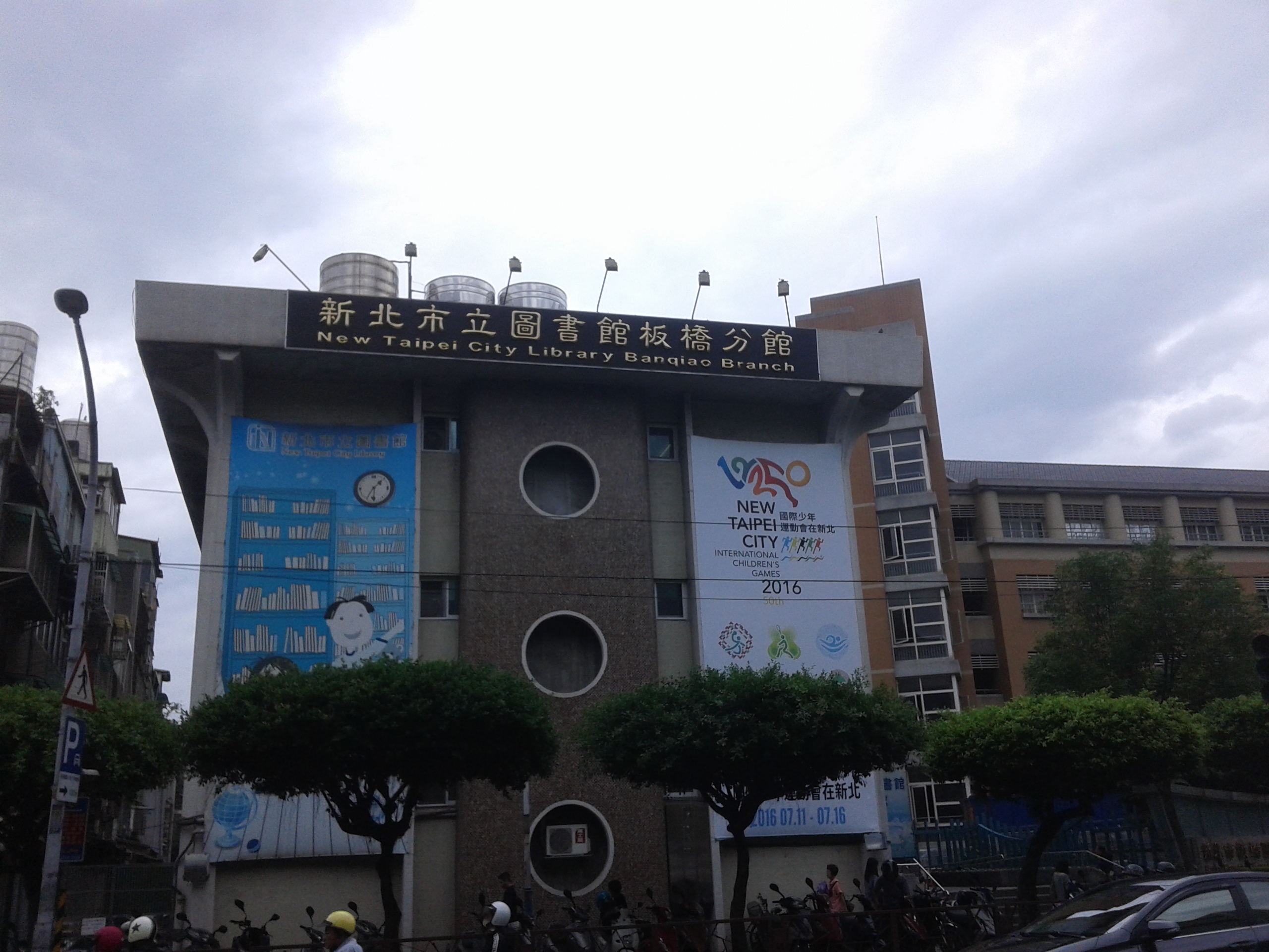 新北市立圖書館板橋分館，位於新北市板橋區文化路一段23號。